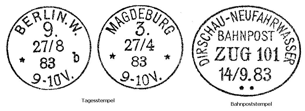 Stempelformen der reichspost